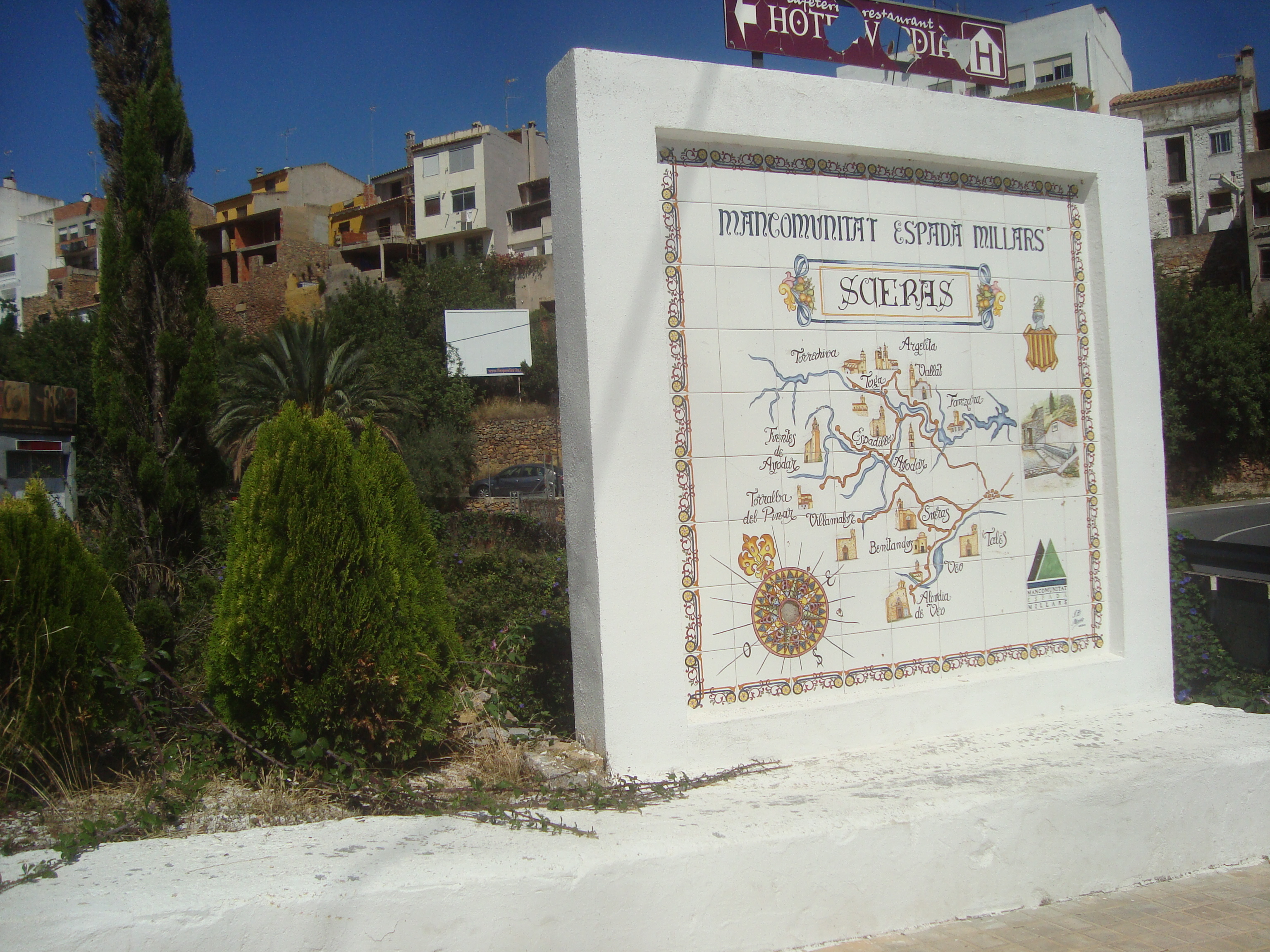 Sueras (Castellón). La Mancomunidad Espadán-Mijares es una mancomunidad de quince municipios de la provincia de Castellón (España), situada entre las comarcas del Alto Mijares y la Plana Baja y que comprende parte del Parque natural de la Sierra Espadán y del Río Mijares. Los municipios que la forman son: Aín, Alcudia de Veo, Argelita, Ayódar, Espadilla, Fanzara, Fuentes de Ayódar, Ribesalbes, Sueras, Tales, Toga, Torralba del Pinar, Torrechiva, Vallat y Villamalur. En el conjunto de los quince municipios existe una población aproximada de 4.500 habitantes.